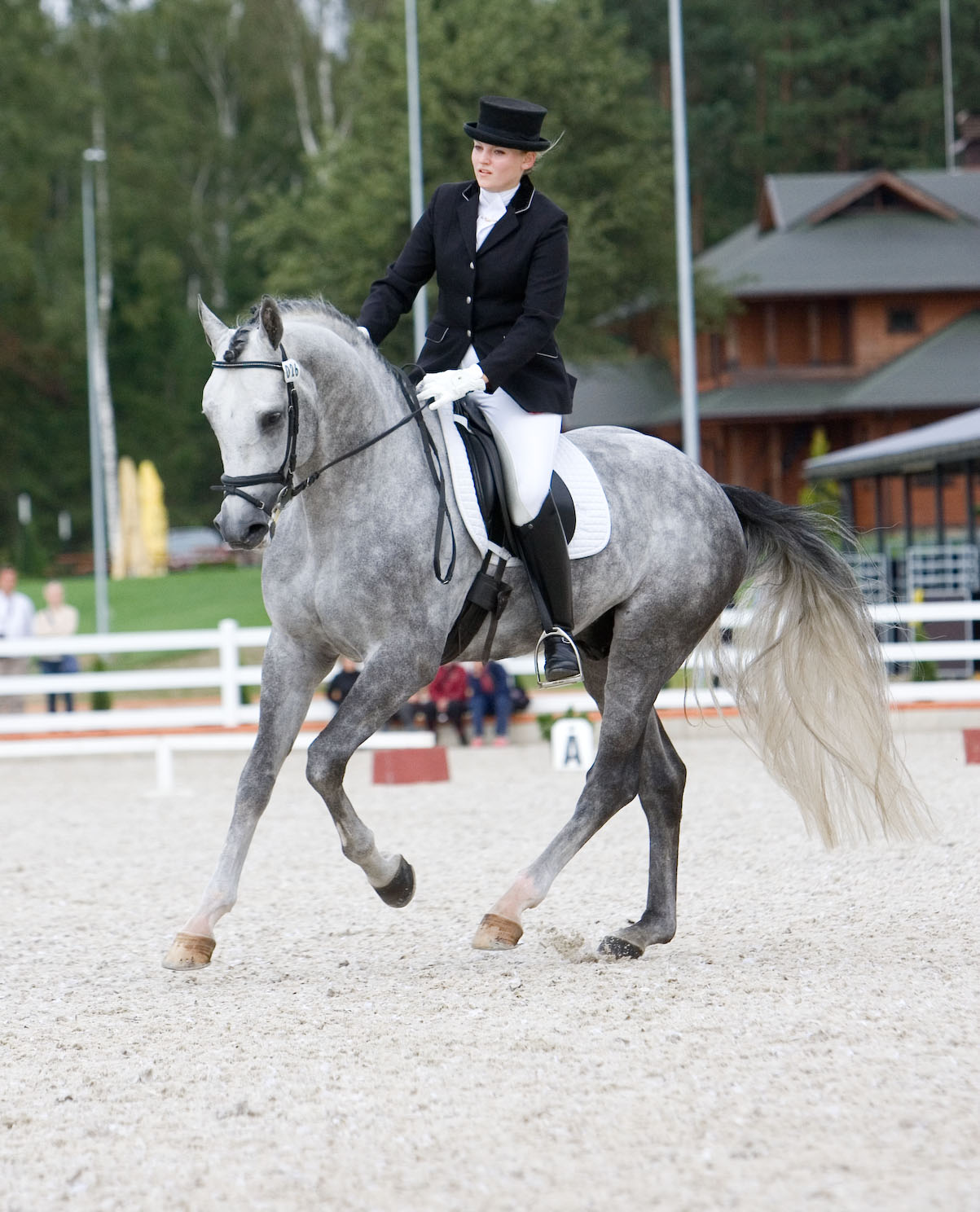 Justina Vanagaitė žirgas Sir Paul "Pasaulio neakivaizdinės varžybos " Vazgaikiemis 2011